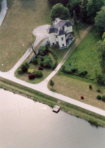 Műemlék vadászház (1850) a Metternich-uradalom majorságának épülete. Azonosító: 6271 törzsszám: 9174 ÉS azonosító: 12106 - Gyermely, Gyarmatpuszta